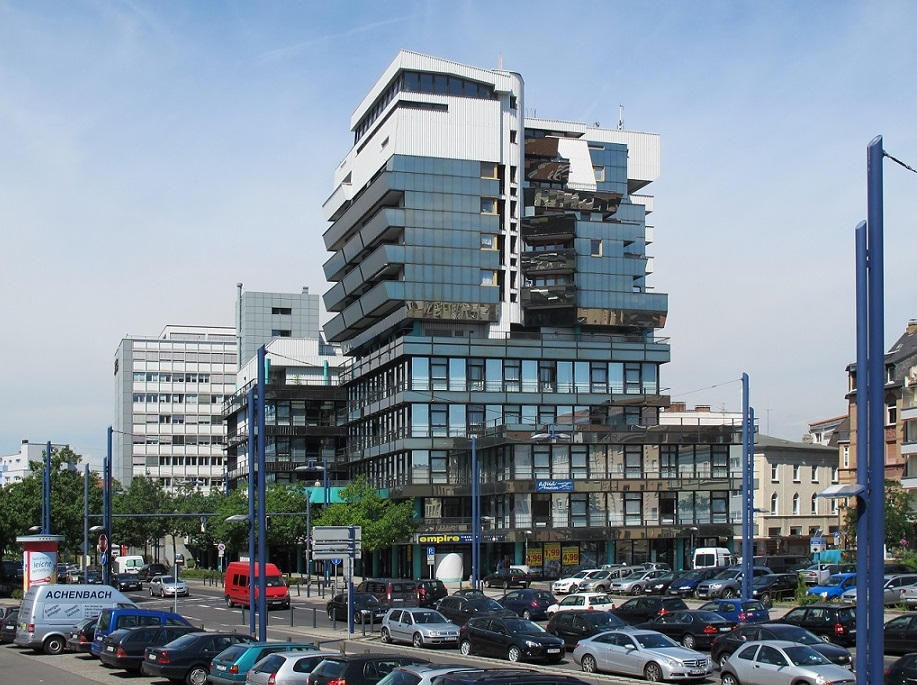 Offenbach/Main, Gothaer-Haus, Berliner Straße: multifunktionaler Großbau, geplant 1972, eingeweiht 1977, Architekten Martin Müller (1921-1993) und Peter Opitz (*1938)/Darmstadt.